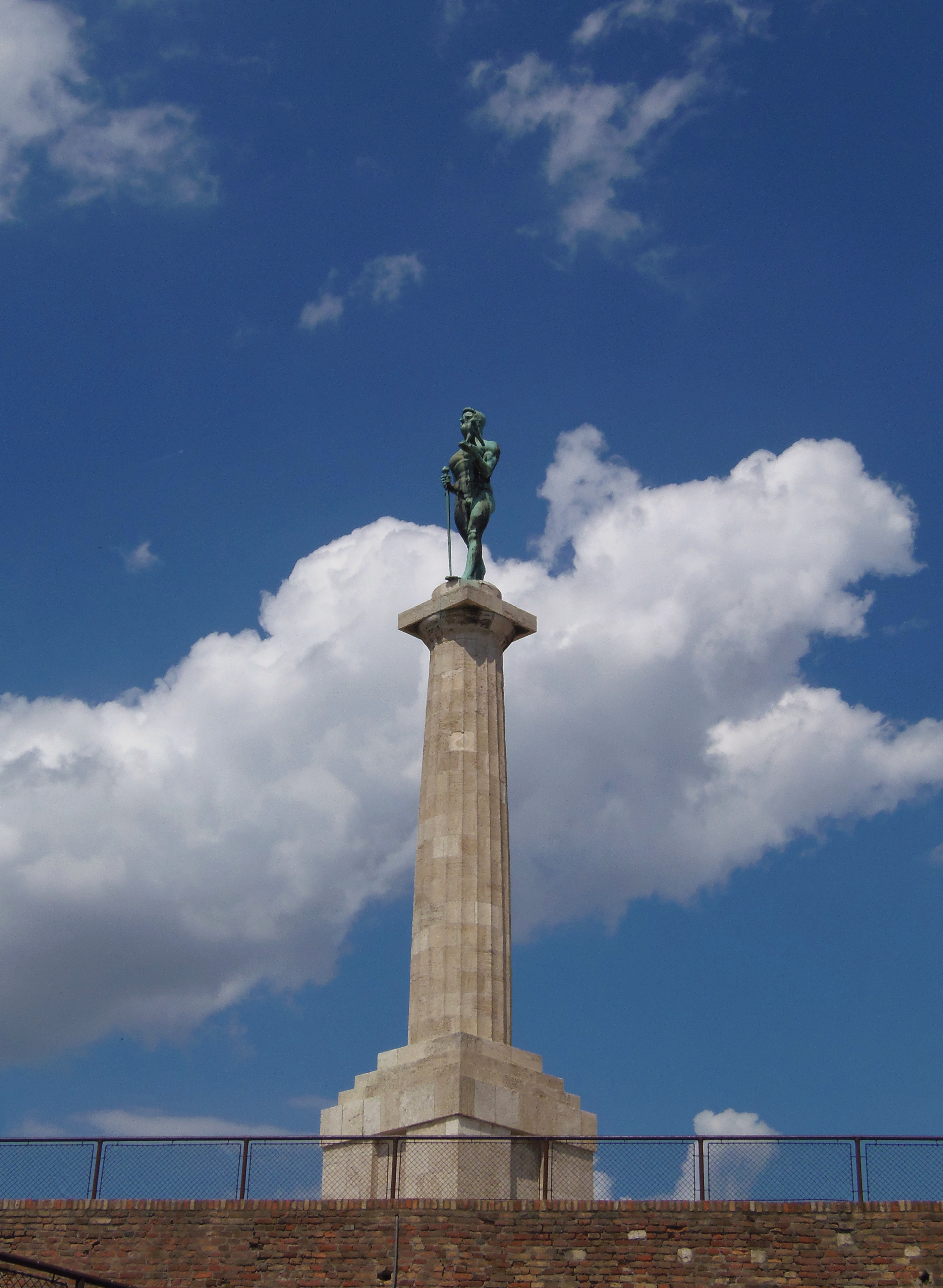 Споменик "Победника" на Калемегдану, у Београду, Србија. Кадар на споменику.